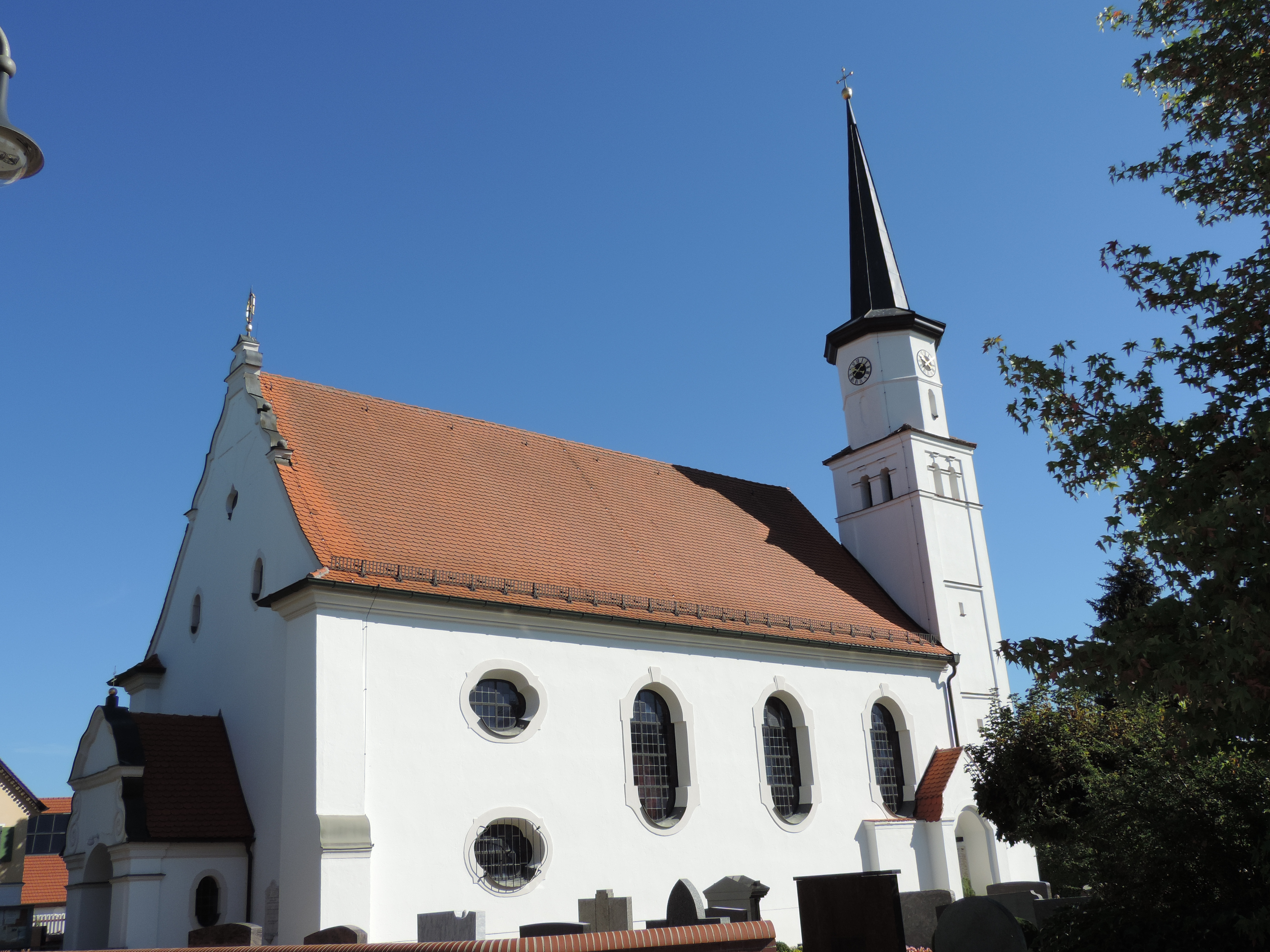 Außenansicht